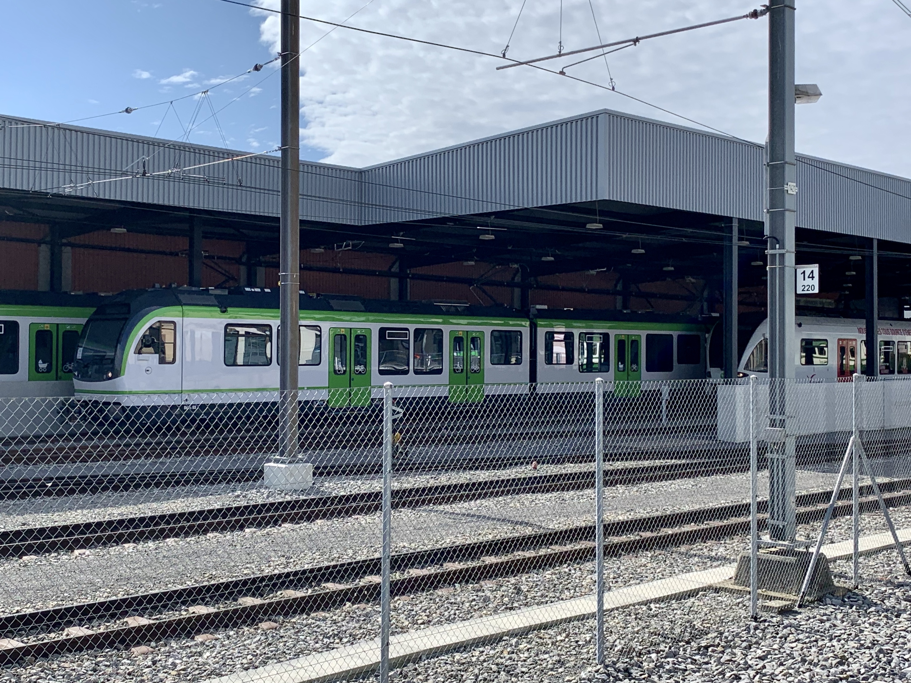 Neuer Triebzug Be 4/8 63 der LEB beim Depot Echallens